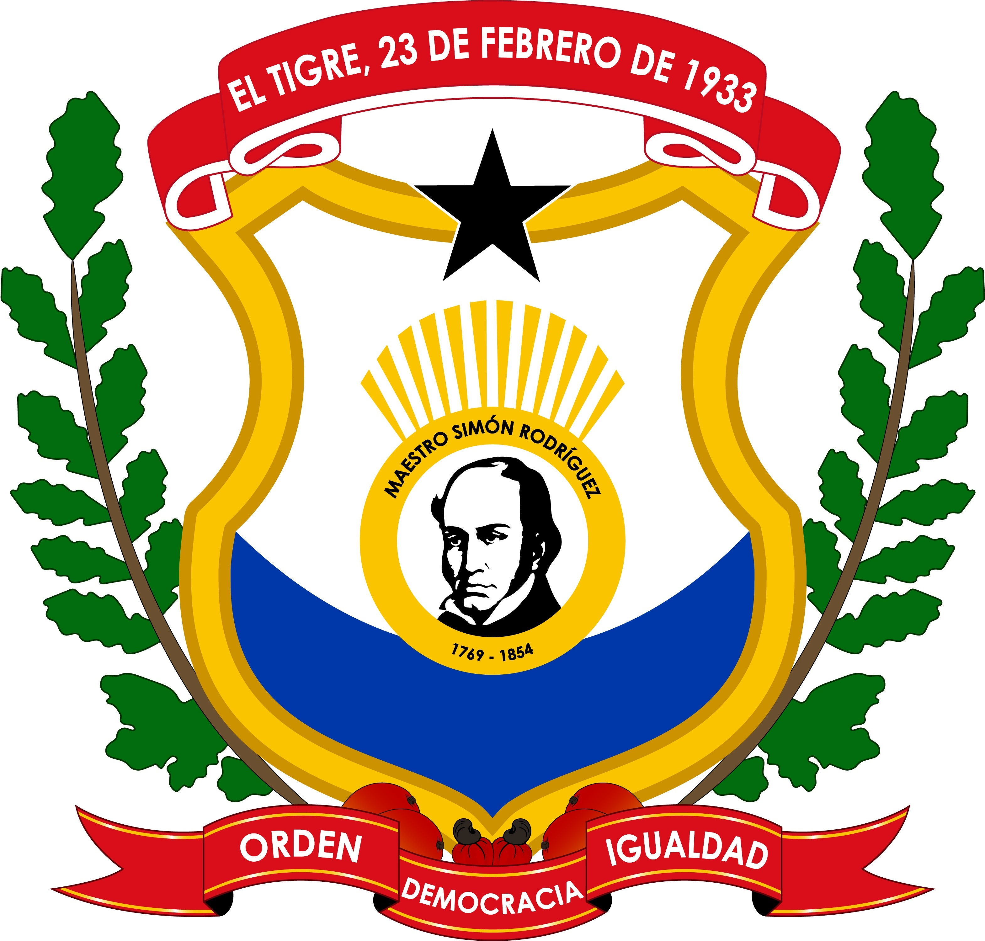 Escudo Municipio Simón Rodríguez, Estado Anzoategui El Escudo del Municipio Simón Rodríguez fue dividido en dos campos horizontales los cuales se describen a continuación: El Campo Superior, de fondo color blanco, lleva doce (12) reflejos de color amarillo oro que simbolizan los rayos del sol saliendo de un círculo dorado donde se encuentra la imagen del insigne maestro de nuestro Libertador Simón Bolívar, "Simón Rodríguez", hombre de mente amplia y de gran sabiduría, cuyo nombre lleva el Municipio. El Escudo está coronado, por una estrella de color negra simbolizando el pozo petrolero OG-1, inmortalizado por el gran escritor, poeta, periodista, ensayista, humorista, novelista, orador; Miguel Otero Silva, en su obra Oficina N° 1, encima del Escudo y la estrella se encuentra una cinta de color roja con la siguiente inscripción: “El Tigre 23 de Febrero de 1933” El Campo Inferior del Escudo de color Azul Marino, que representa la riqueza y abundancia de agua subterránea que posee nuestro municipio. En la base del Escudo salen dos ramas de curatella americana (Chaparro) atadas con una cinta de color rojo que lleva la siguiente inscripción: A la izquierda “Orden”, en el centro: “Democracia”, a la derecha “ Igualdad”. Sobre la cinta que ata las ramas de la curatella americana (Chaparro), se encuentran cuatro frutos: dos (2) Mangos (Mangífera indica L.) y dos Mereyes (Anacardium occidentale L. ), producidos y cosechados en abundancia en nuestras tierras.